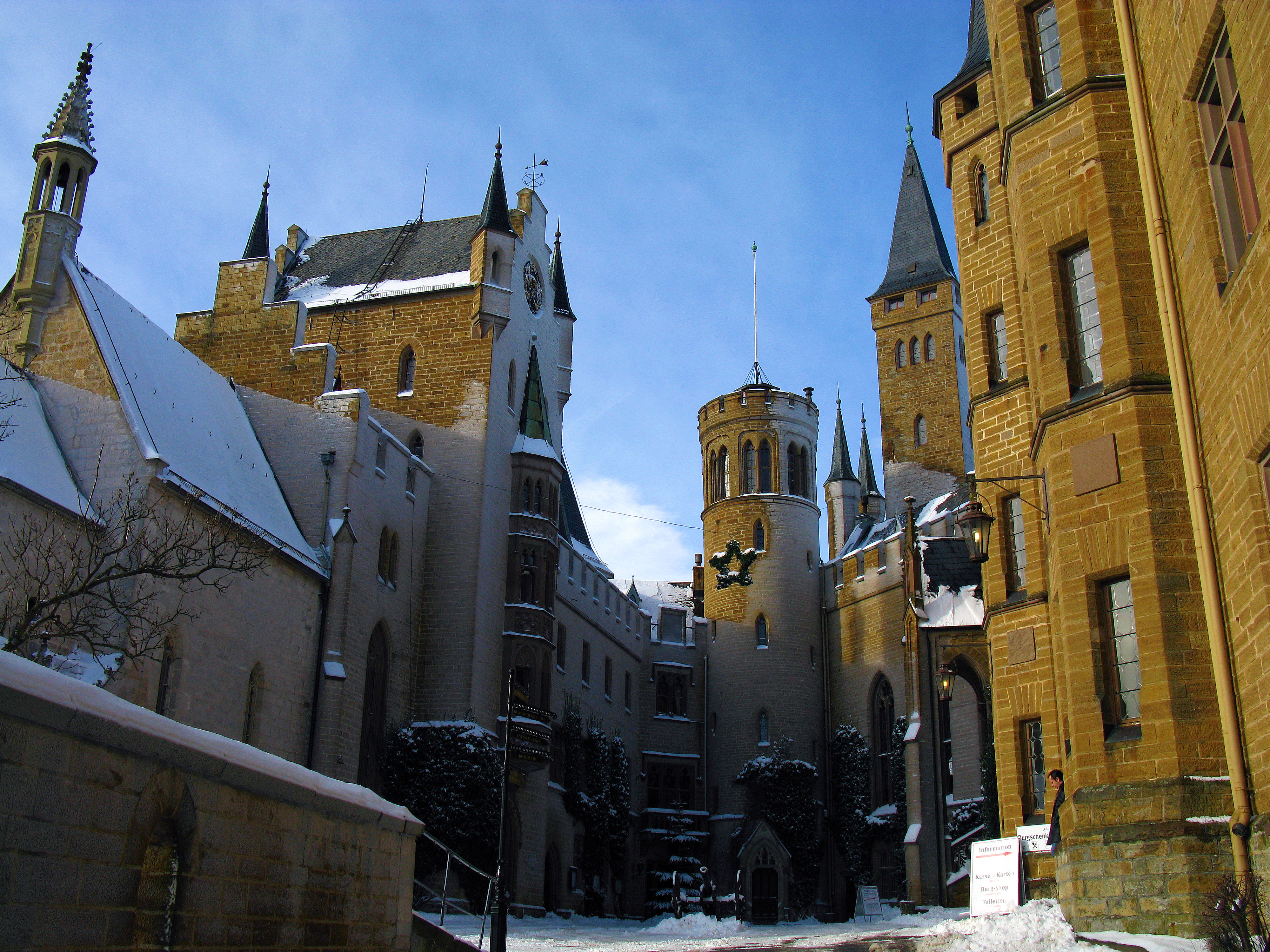 Imagen del patio central del castillo de Hohenzollern